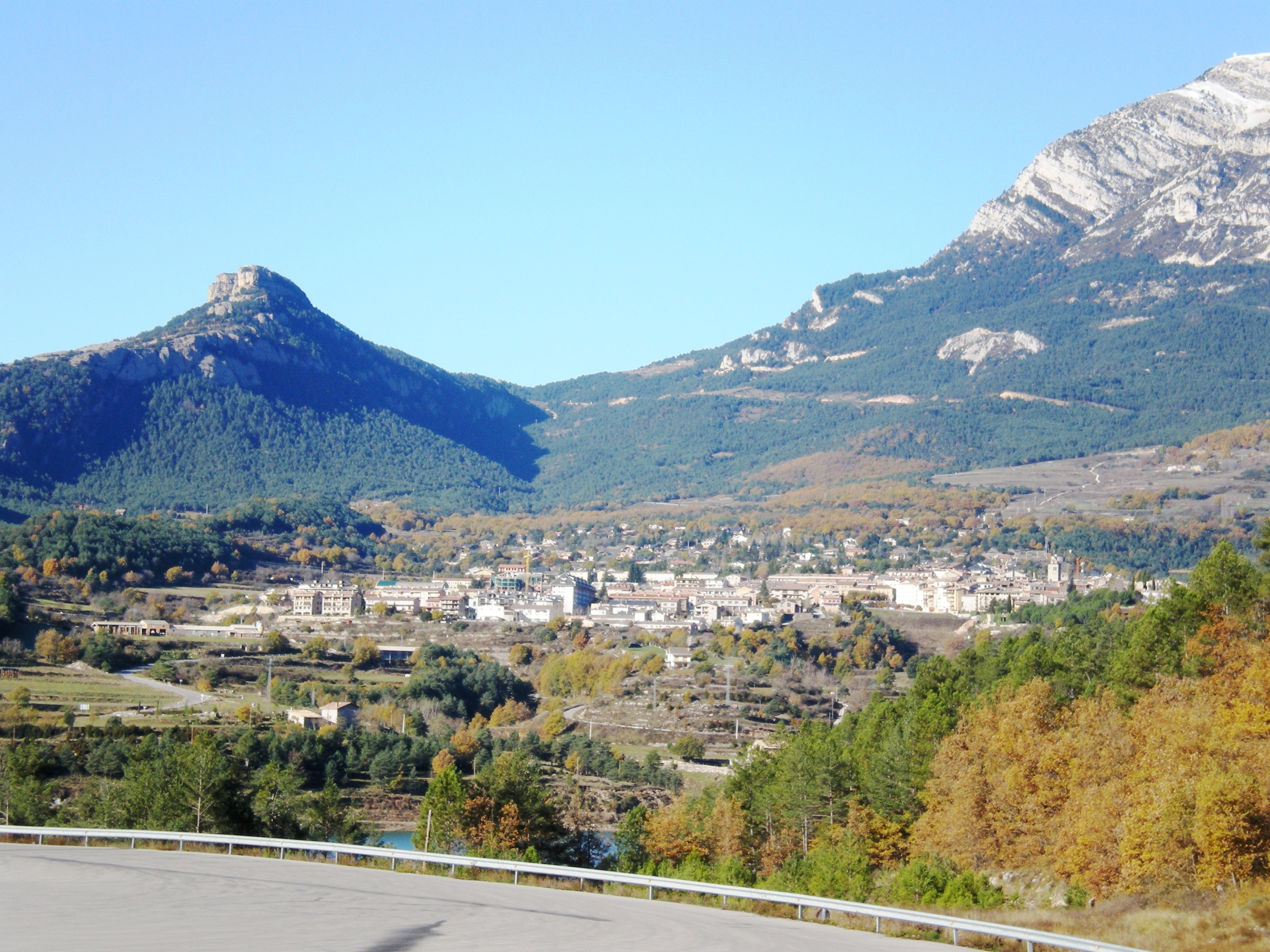 El curs alt i el tram final del torrent de les Salines des dels pàrquing de la Knauf Al fons i a l'esquerra, el tossalde la Creu del Codó (1.509 m). Al fons i al centre, Coll de Jou. Al fons i a la dreta de la imatge, el Vessant meridional del Puig de les Morreres (serra de Querol) de 2.212. Al centre da la imatge, la vila de Sant Llorenç de Morunys. Sota el poble s'hi entreveu l'últim tram del torrent.